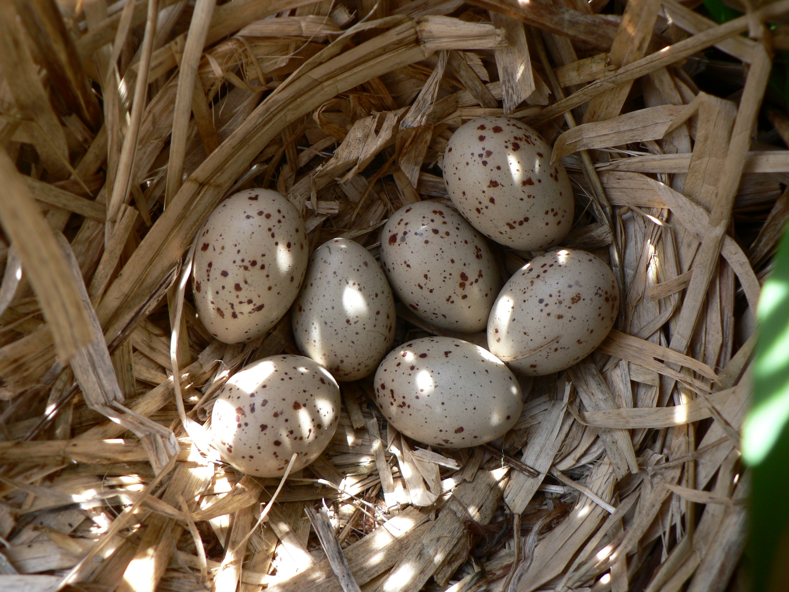 nest of common Moorhen (Gallinula chloropus) - Wilgenhoek, Deerlijk, Belgium